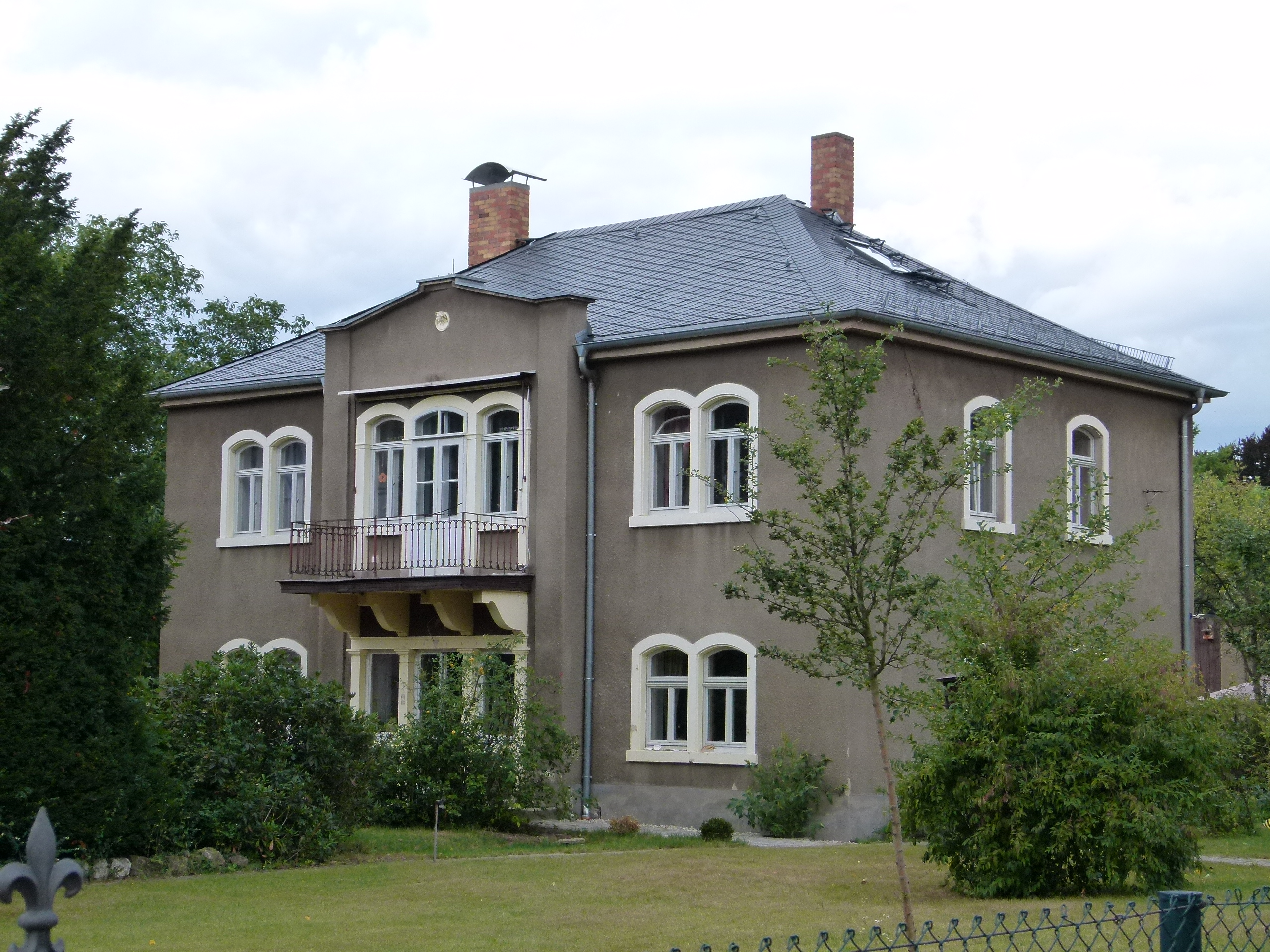 Denkmalgeschütztes Haus, Augustusweg 18, Radebeul, Sachsen